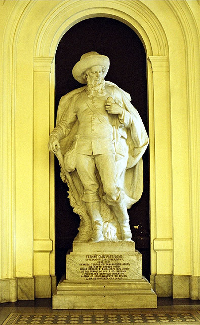 Estátua do bandeirante Fernão Dias Pais Leme no Museu do Ipiranga, São Paulo - Brasil.